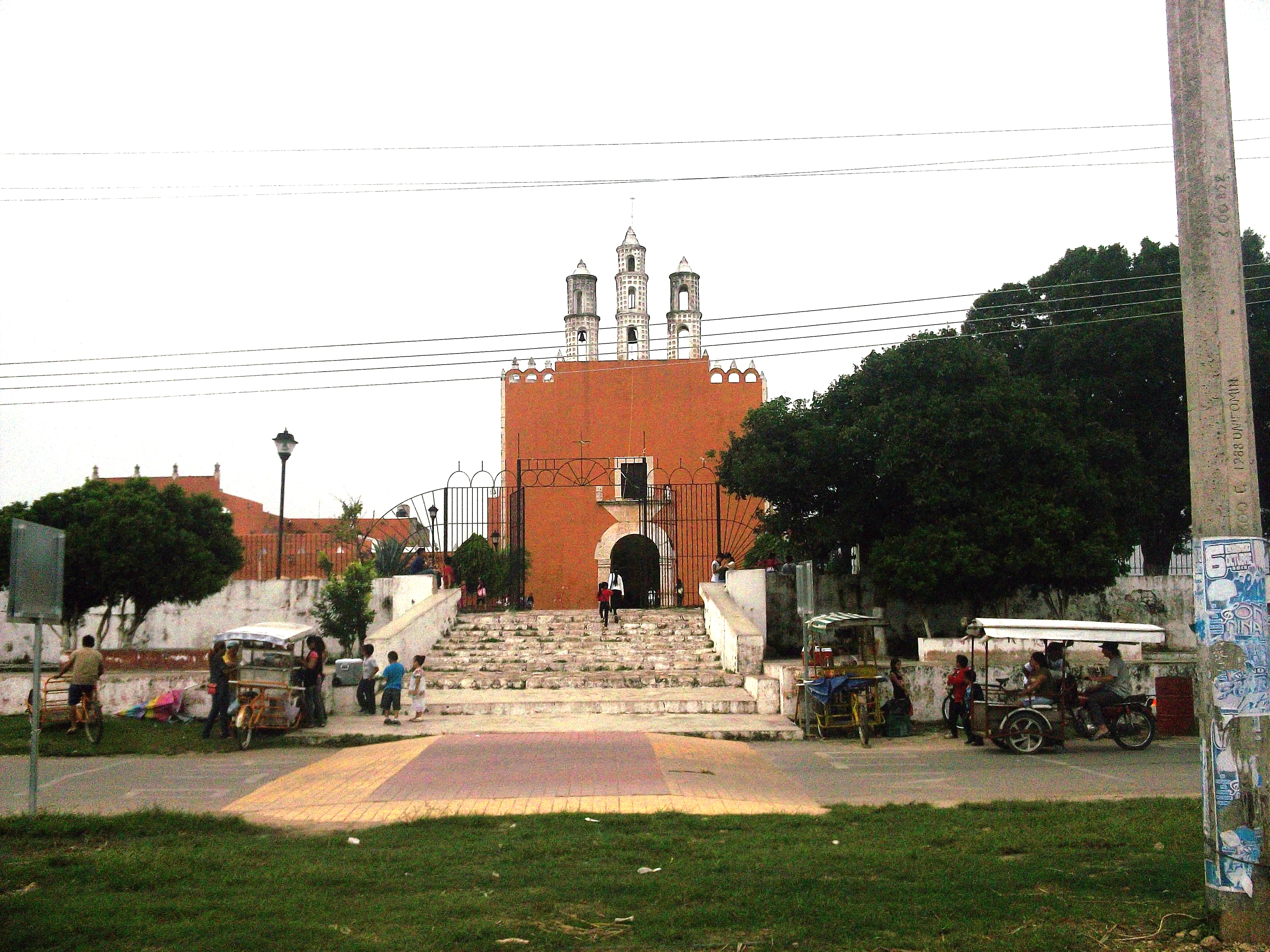 Iglesia de Homún, Yucatán.